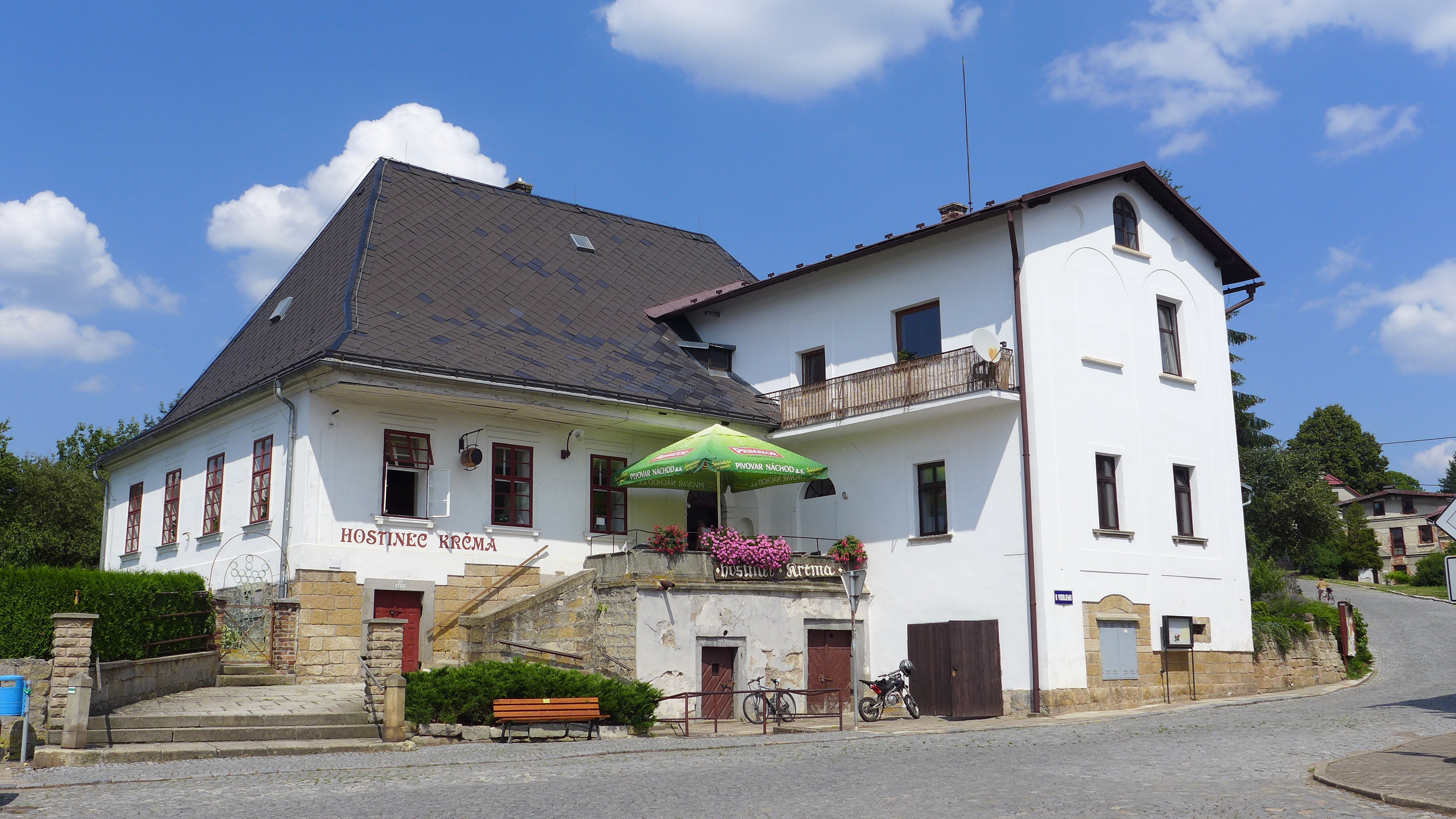 Hospoda Krčma, K Vodojemu 1, Velká Ledhuje.